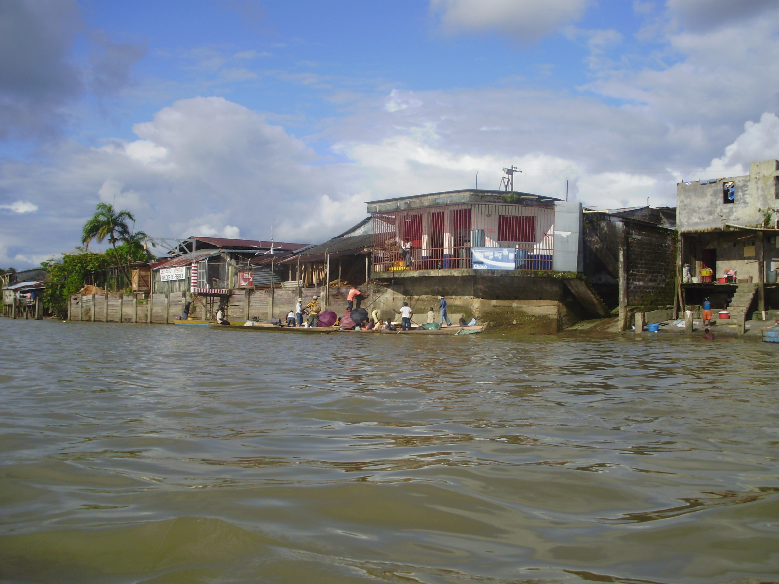 Rio Atrato Choco Quibdo, el segundo rio mas caudaloso del mundo, despues del Nilo. Ombligo del mundo. Africa CHOColombia...